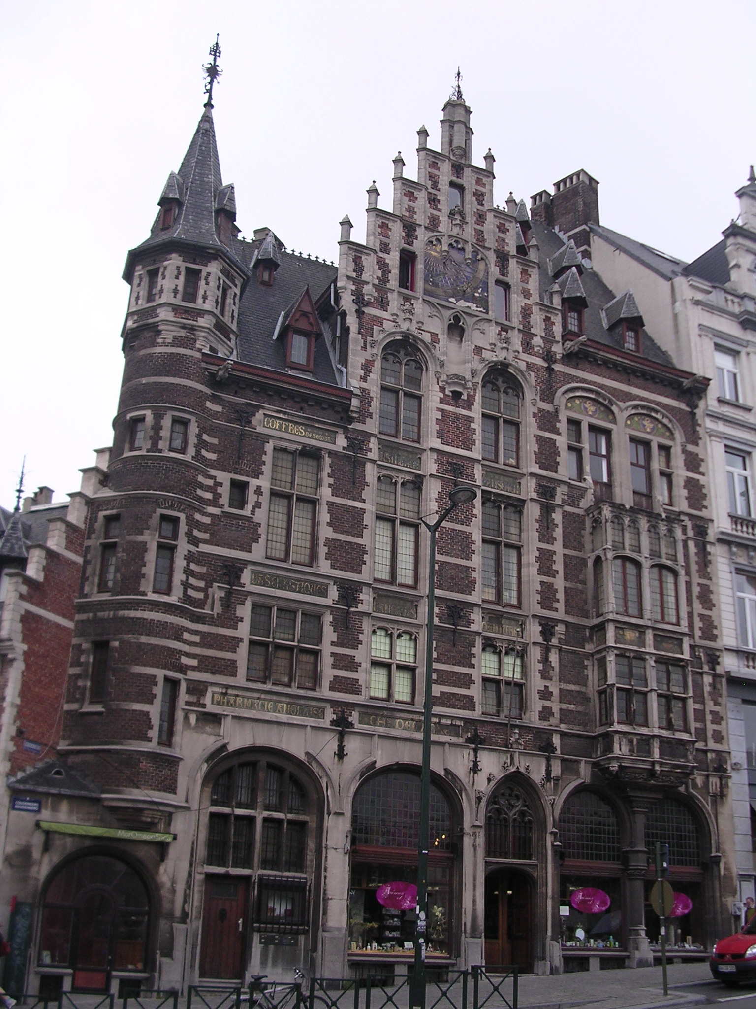 Caudenberg, 64 Bruxelles - 1898 par Paul Saintenoy - immeuble néo-gothique